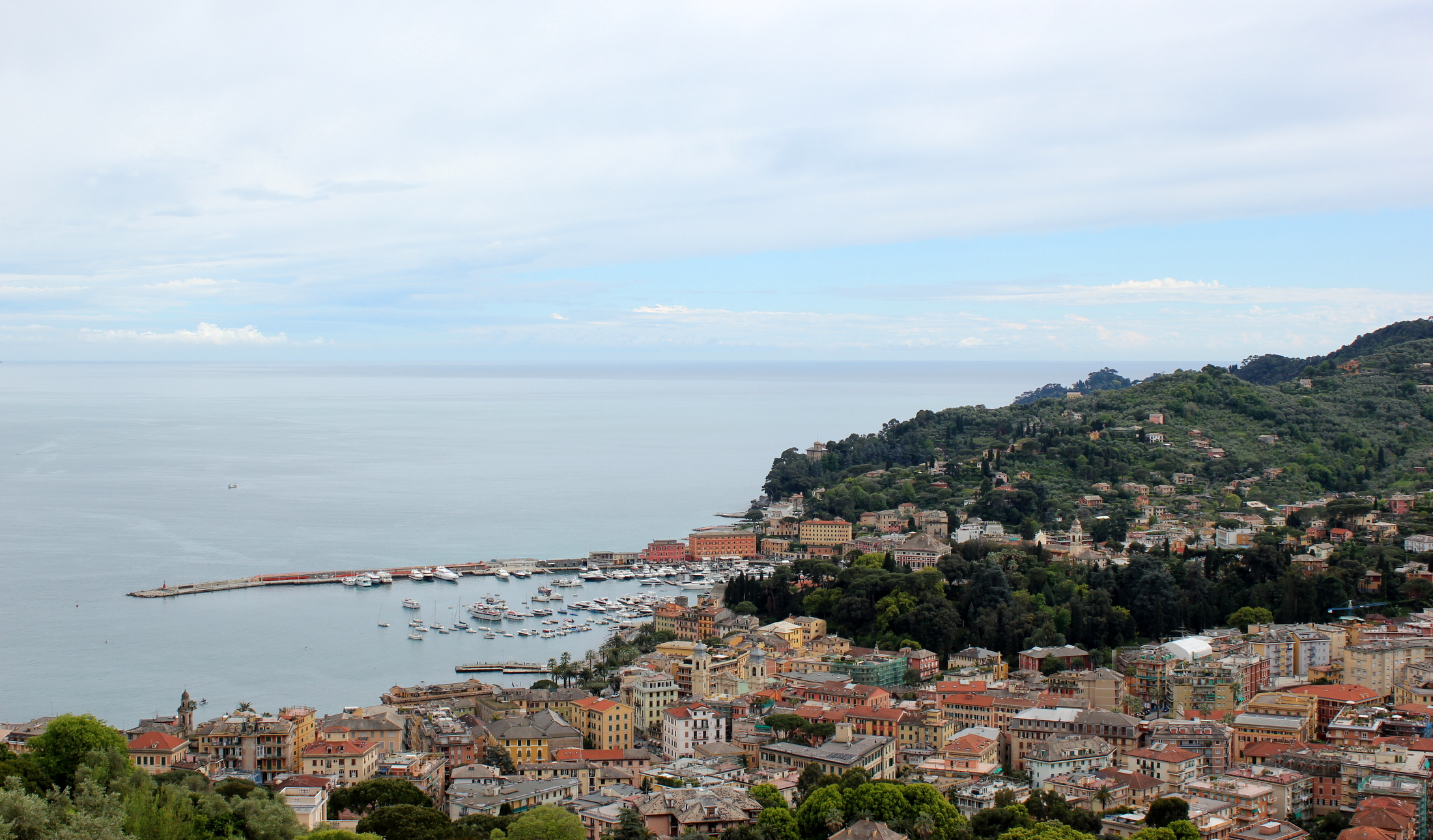 Blick auf Santa Margherita Ligure, Italien.